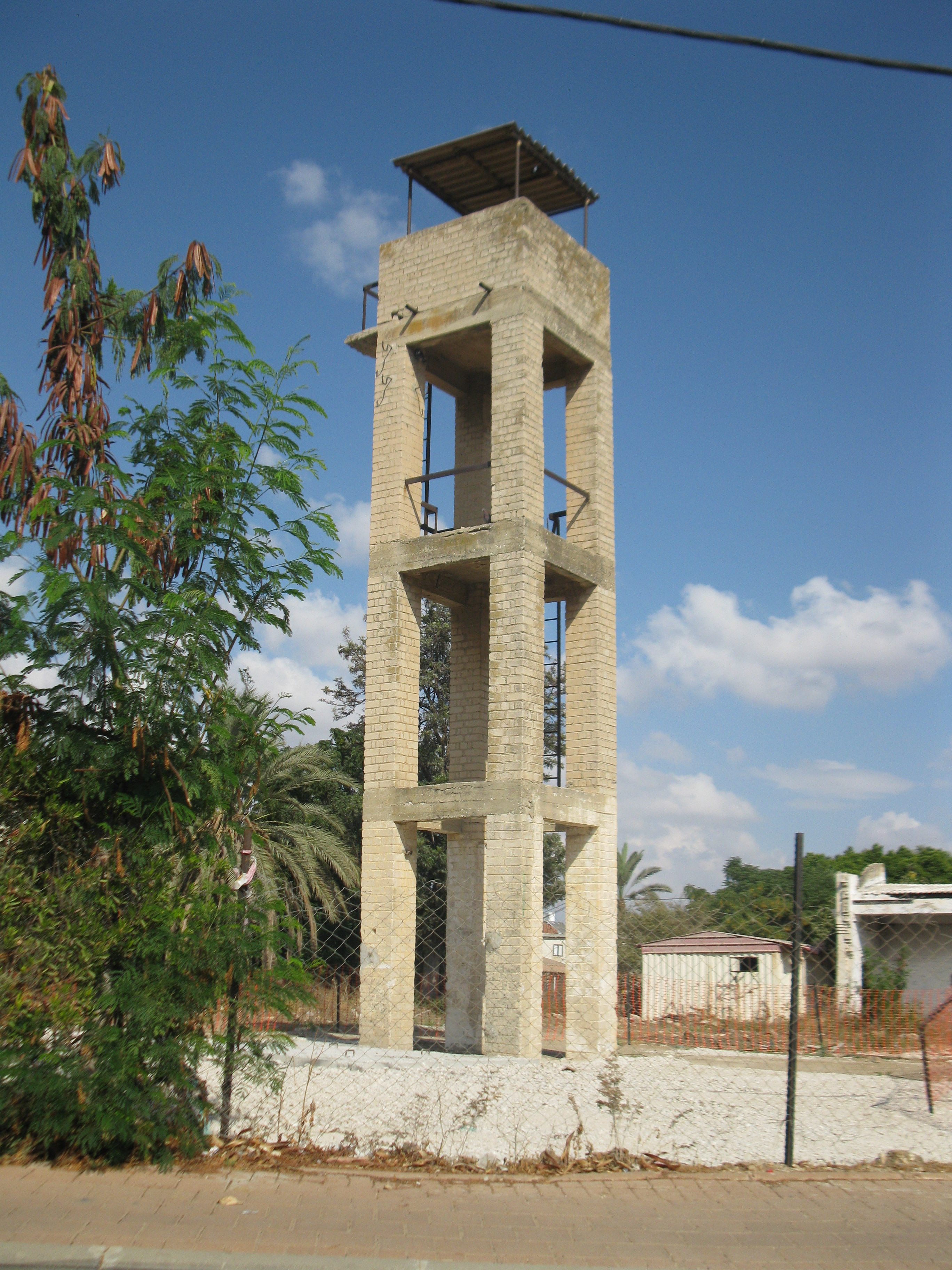 מגדל שמירה בריטי ברחוב אבן גבירול ראש העין